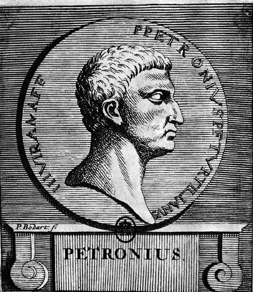 Drawing from : Favissae, utriusque antiquitatis tam romanae quam graecae, in quibus ..., by Henricus Spoor, Gerardi Muntendam, 1707, p. 101.